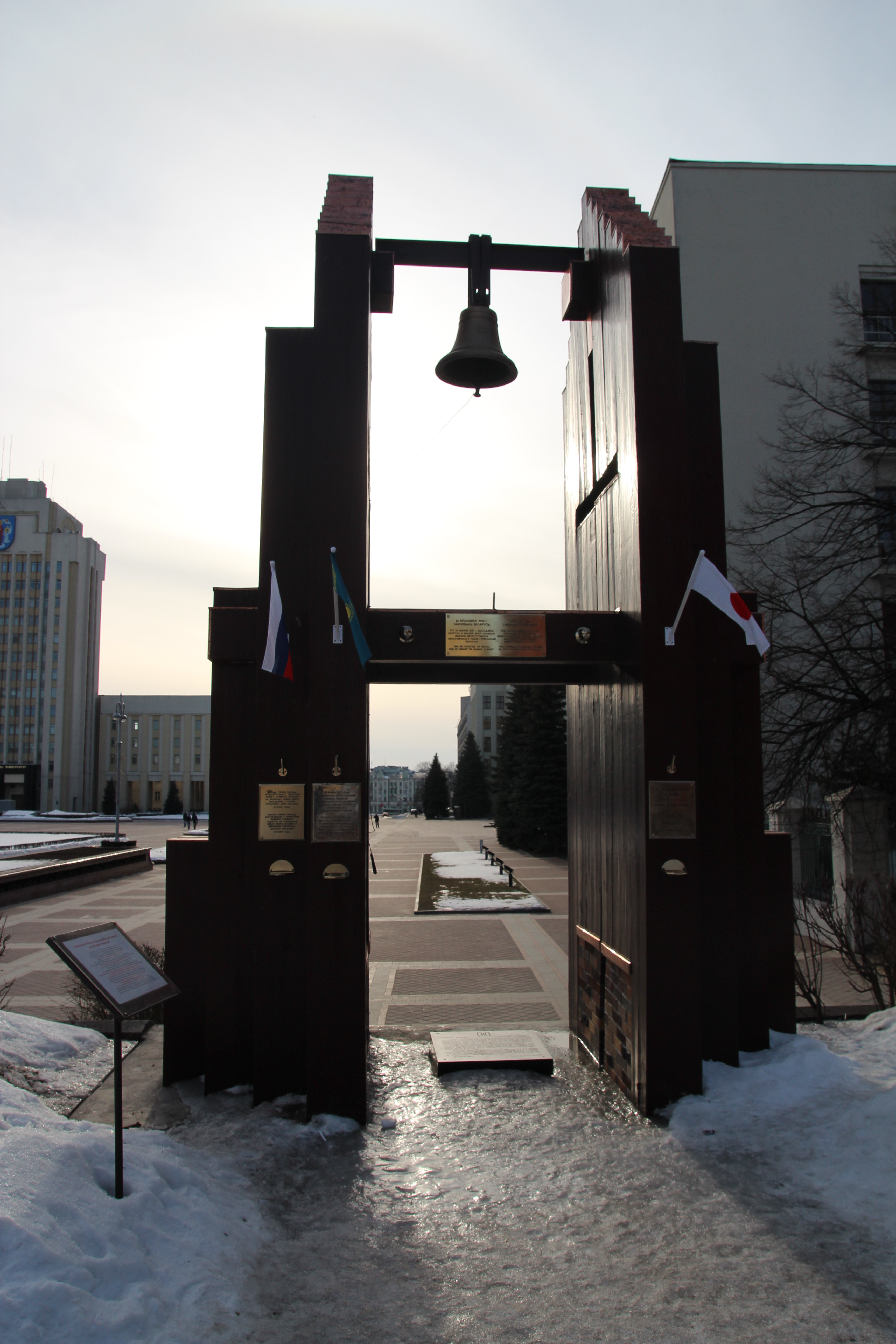 Колокол Нагасаки